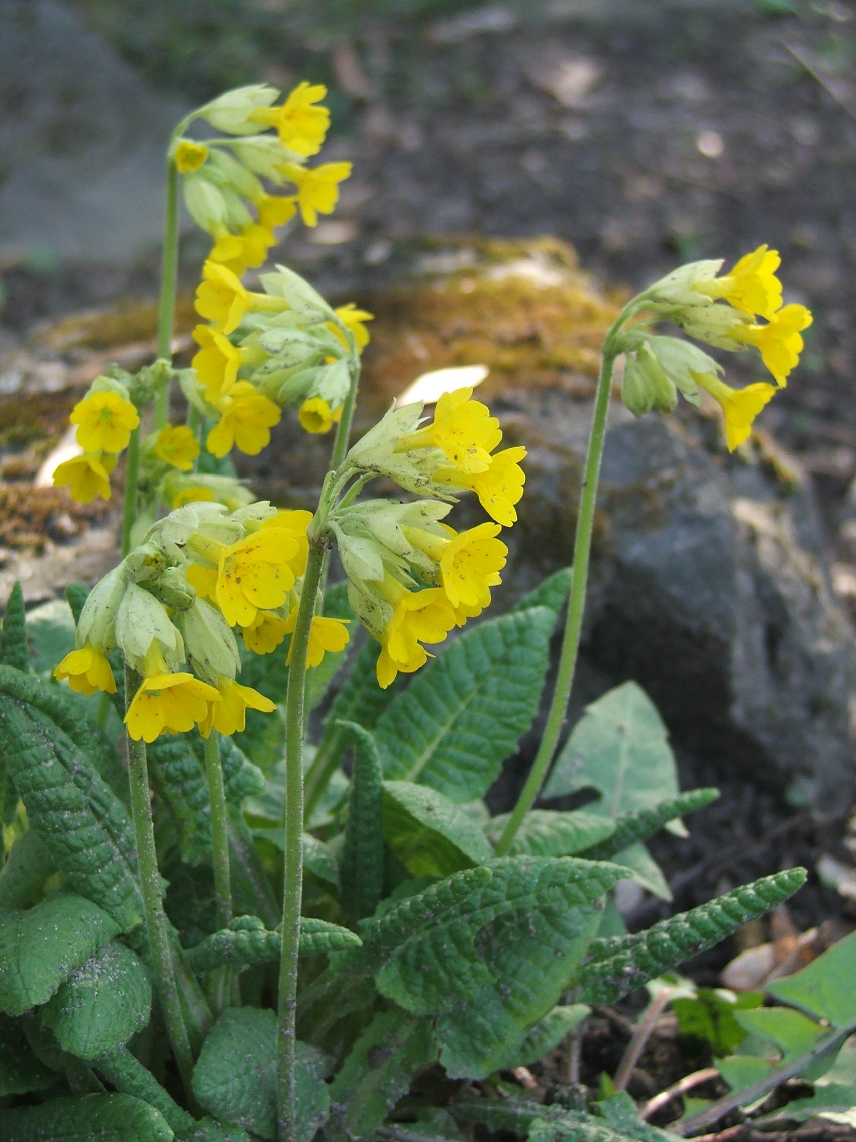 Primula veris subsp. macrocalyx - MTA Botanic Garden Vácrátót, Hungary